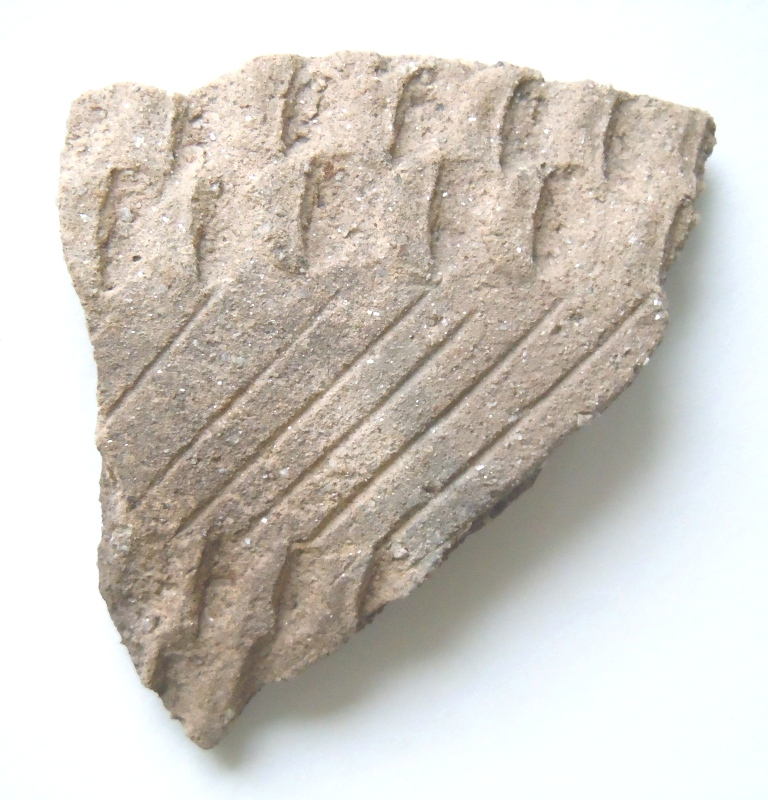 Фрагмент керамики дольменной культуры с поселения Чубукин Бугор.